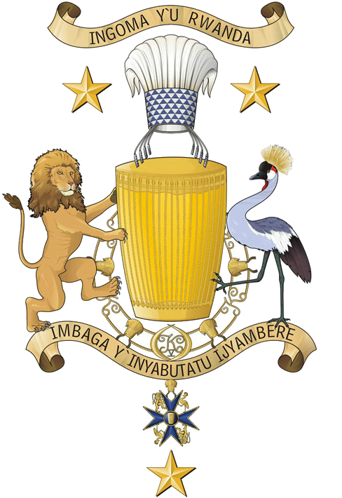 הסמל המלכותי של רואנדה